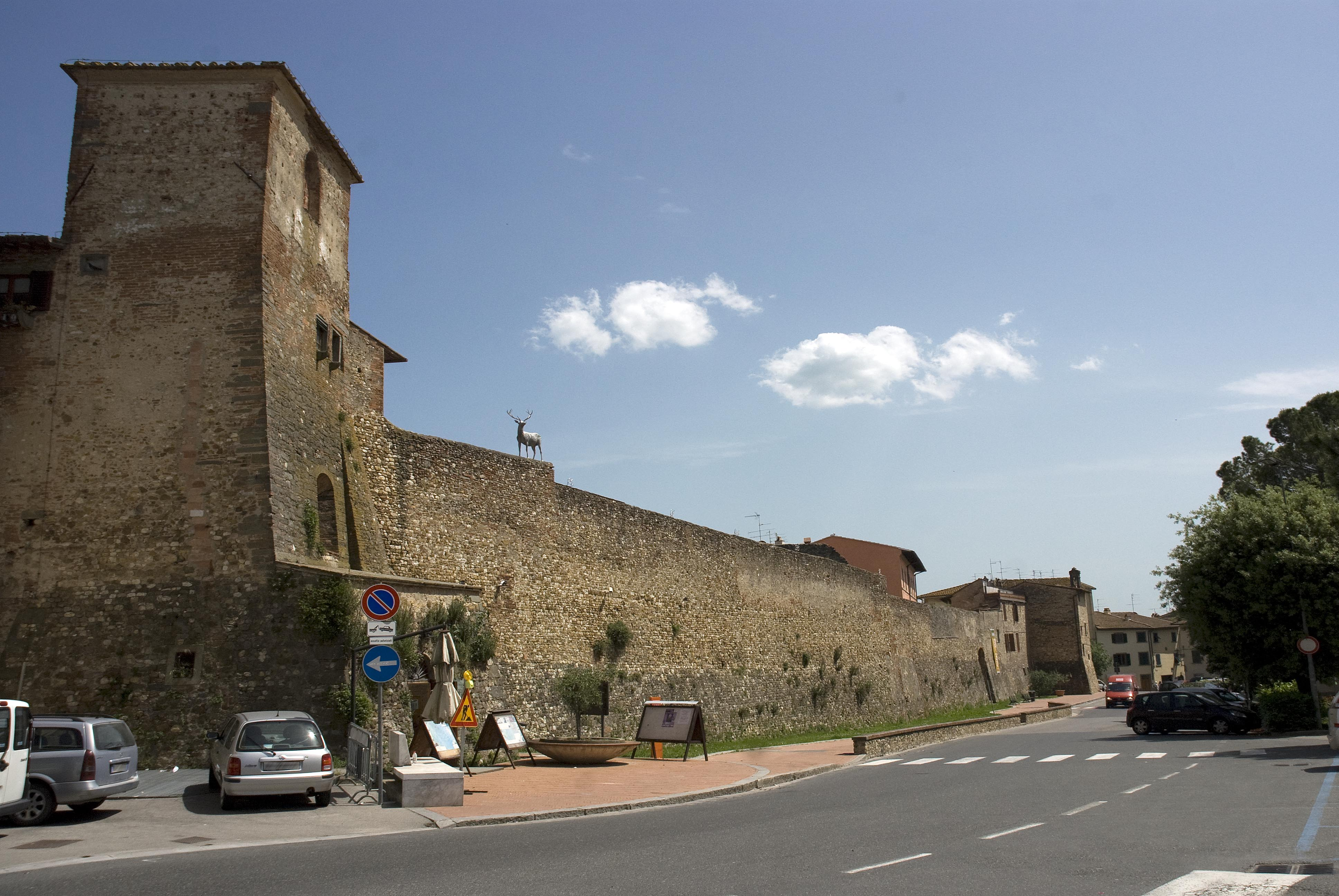 Mura medieoevali di San Casciano in Val di Pesa